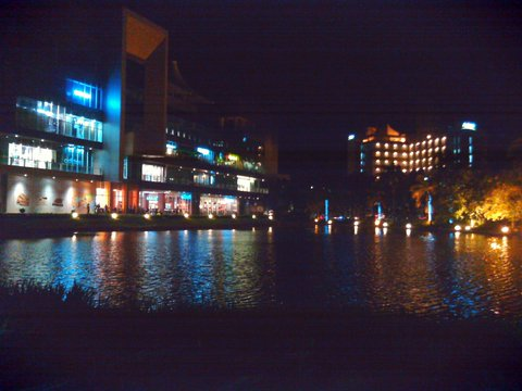 Palembang Icon, The First Life Style Mall